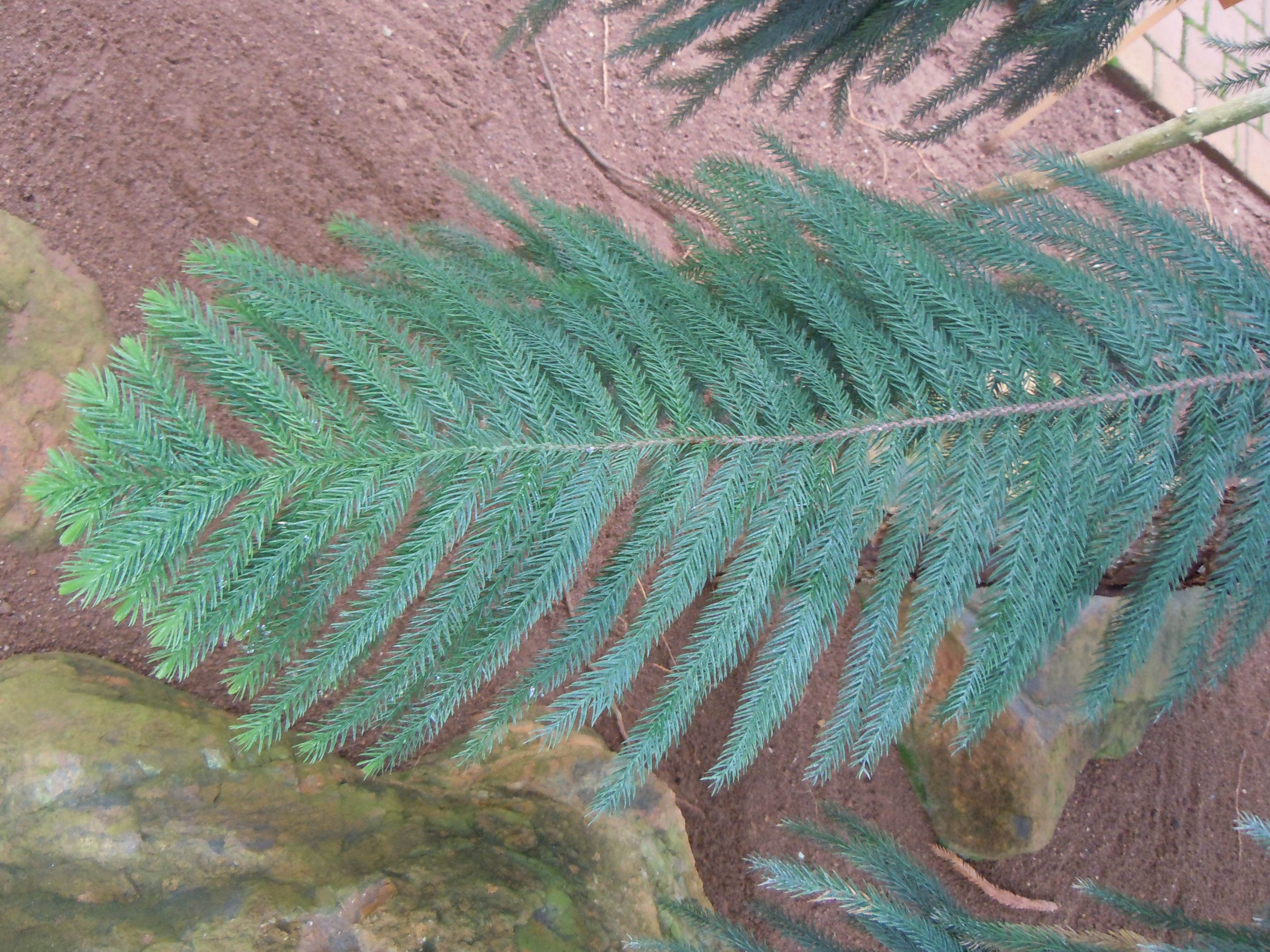 Araucaria nemorosa - Serres d'Auteuil - détail de la feuille.